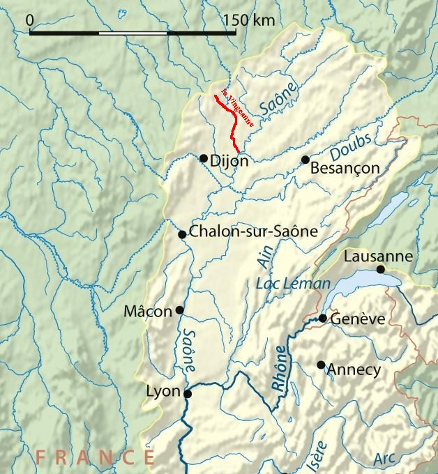 surlignage du tracé de la rivière Vingeanne (affluent de la Saône) - France